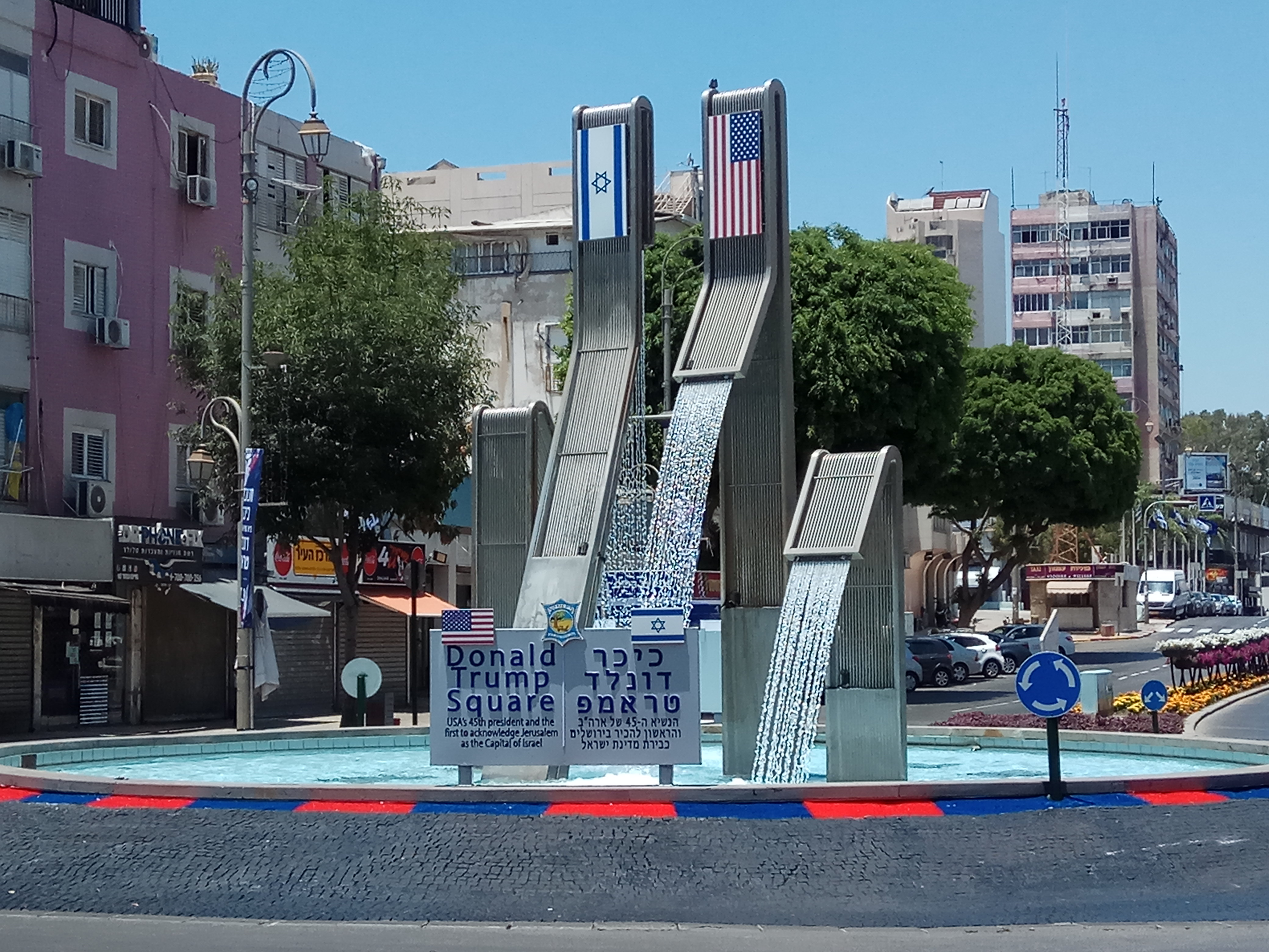 כיכר דונלד טראמפ ברחוב חיים עוזר בפתח תקווה